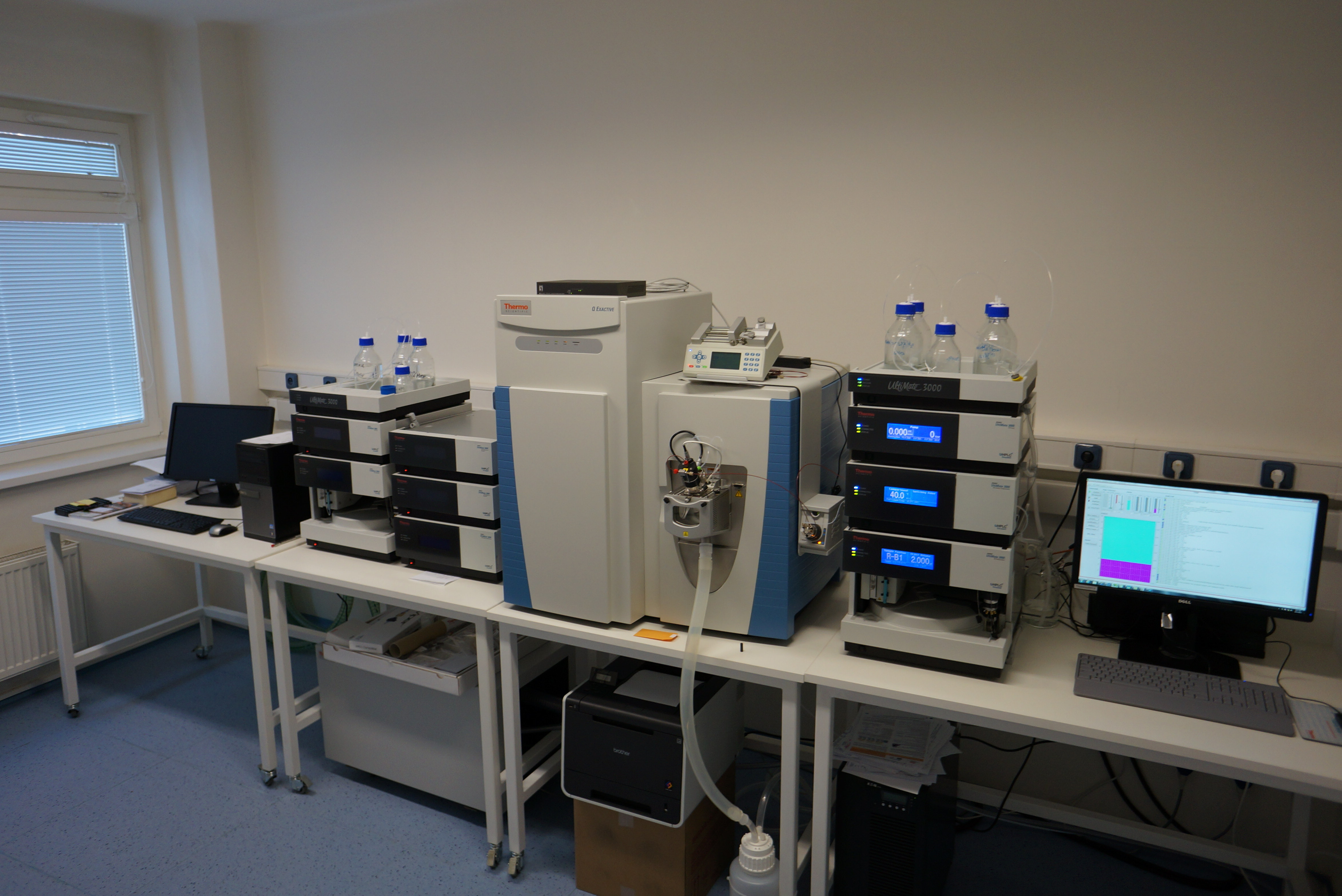 Laboratoř v senzorickém centru